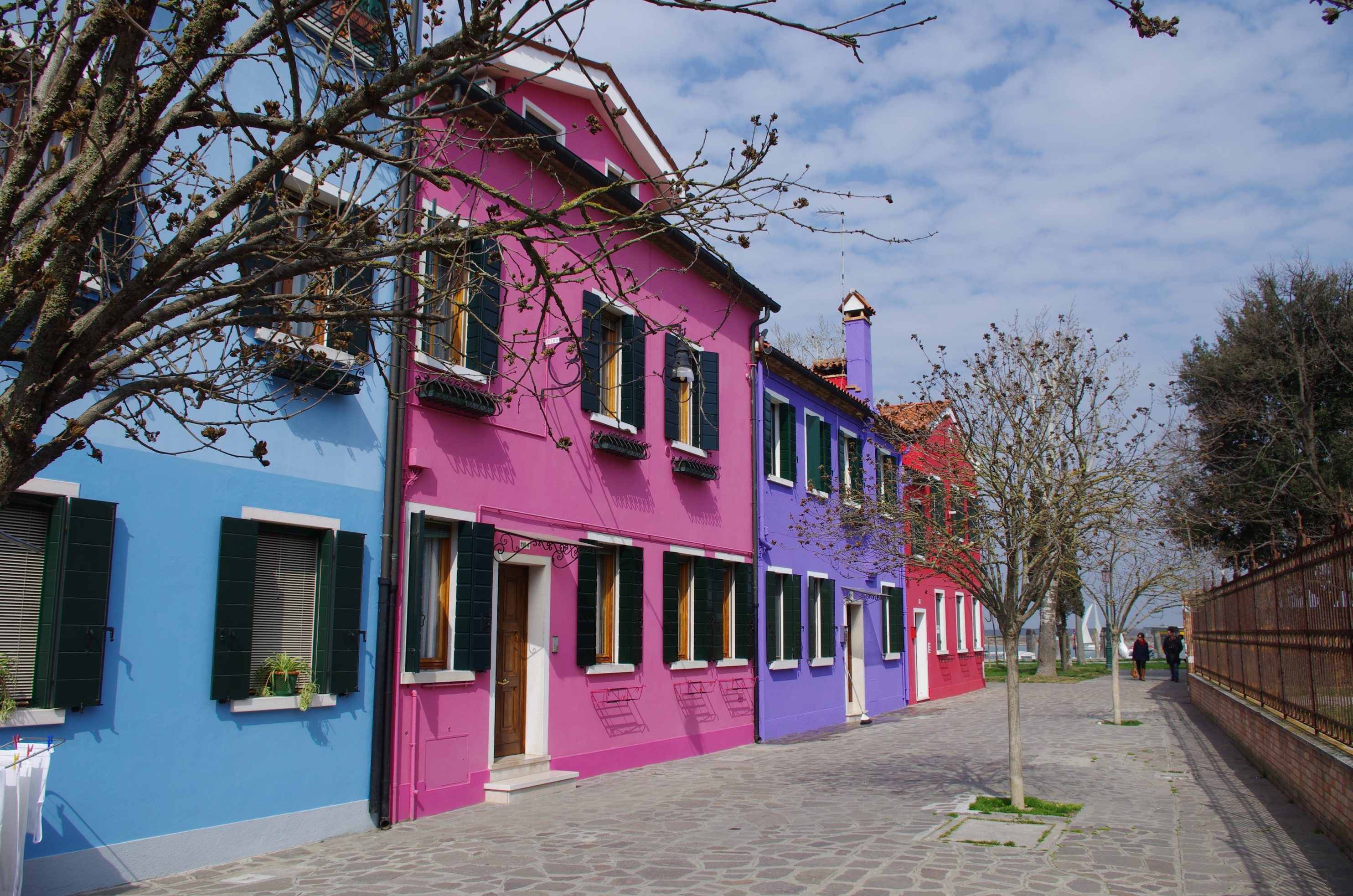 Burano in Venedig. Häuserzeile in der Nähe der Anlegestelle der Schiffe. Corte Comare.